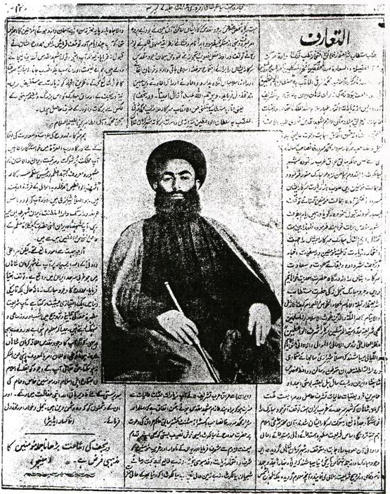 "Dürrü Nəcəfi" jurnalının 2-ci səhifəsində Pişəvər gecələri haqqında məqalə